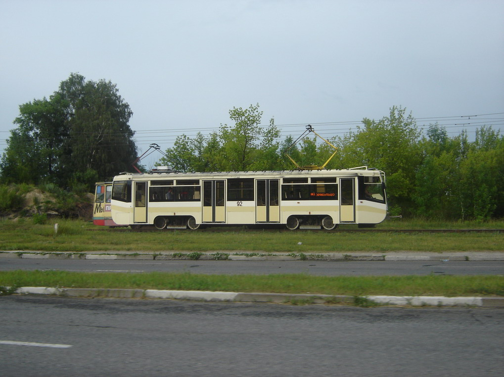 tramway